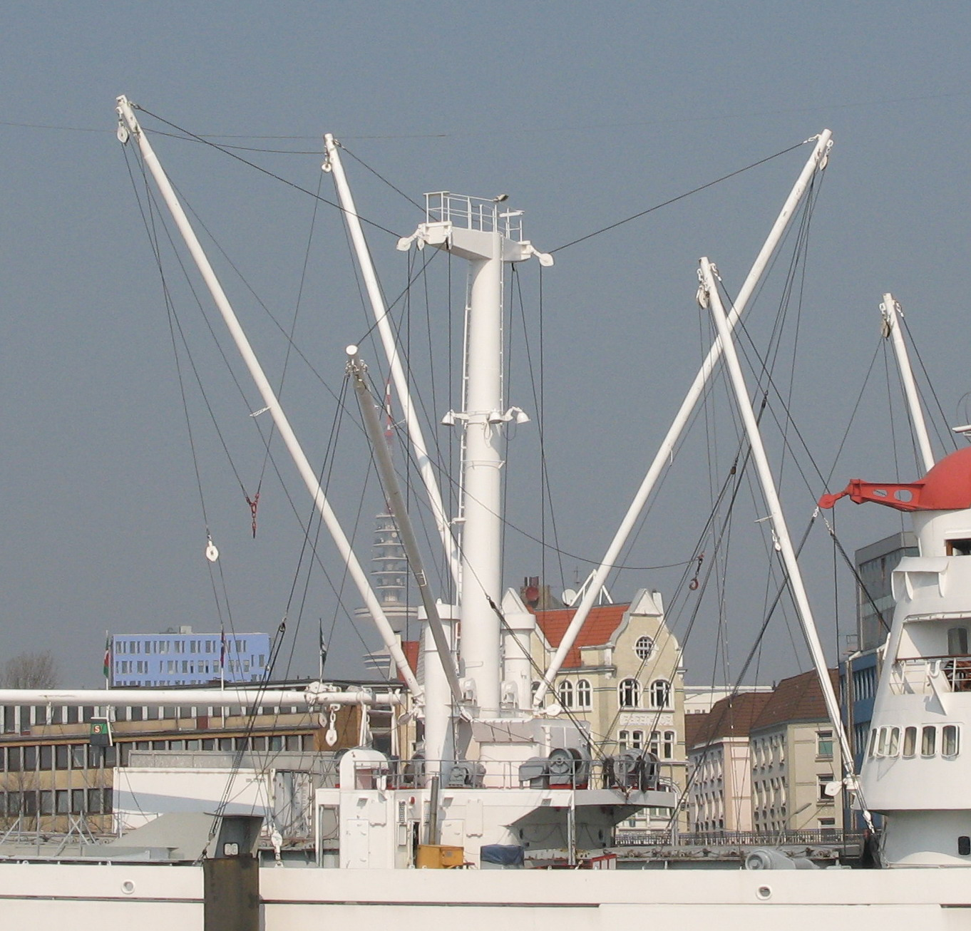 Foto der Ladebäume des Museumsschiffs 'Cap San Diego', Hamburg